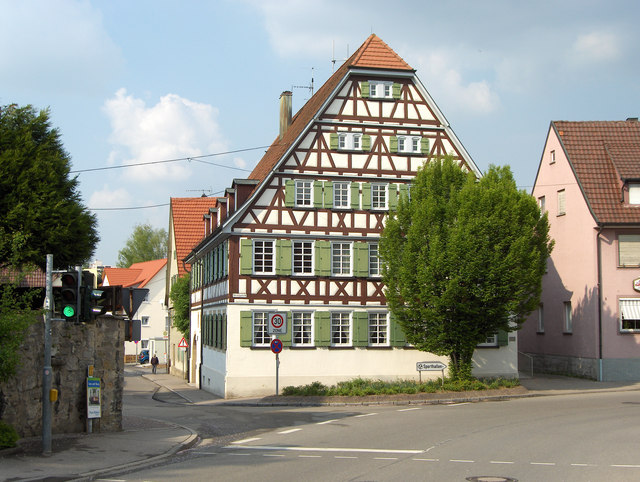 Fachwerkhaus in Magstadt